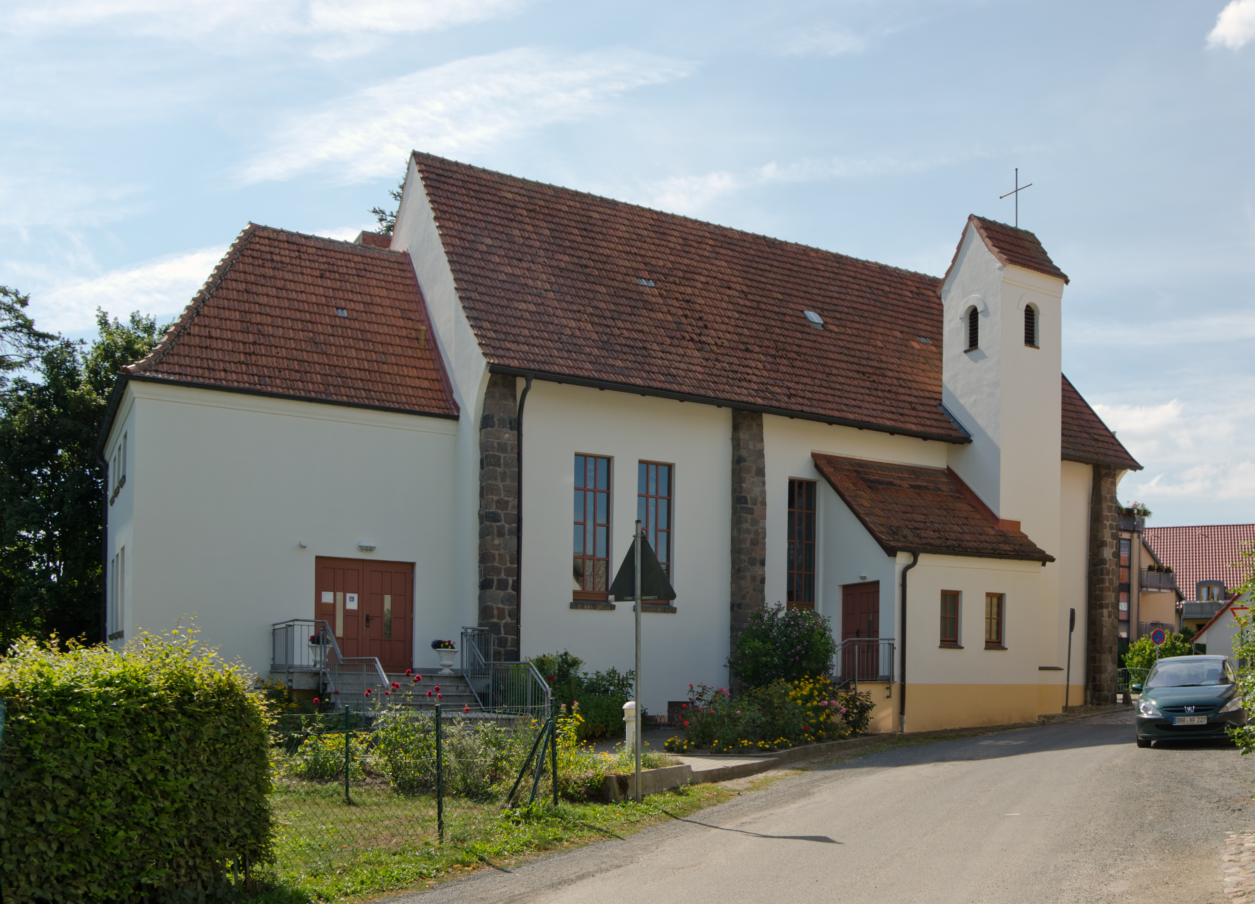 Schwaan Kirche St.Joseph